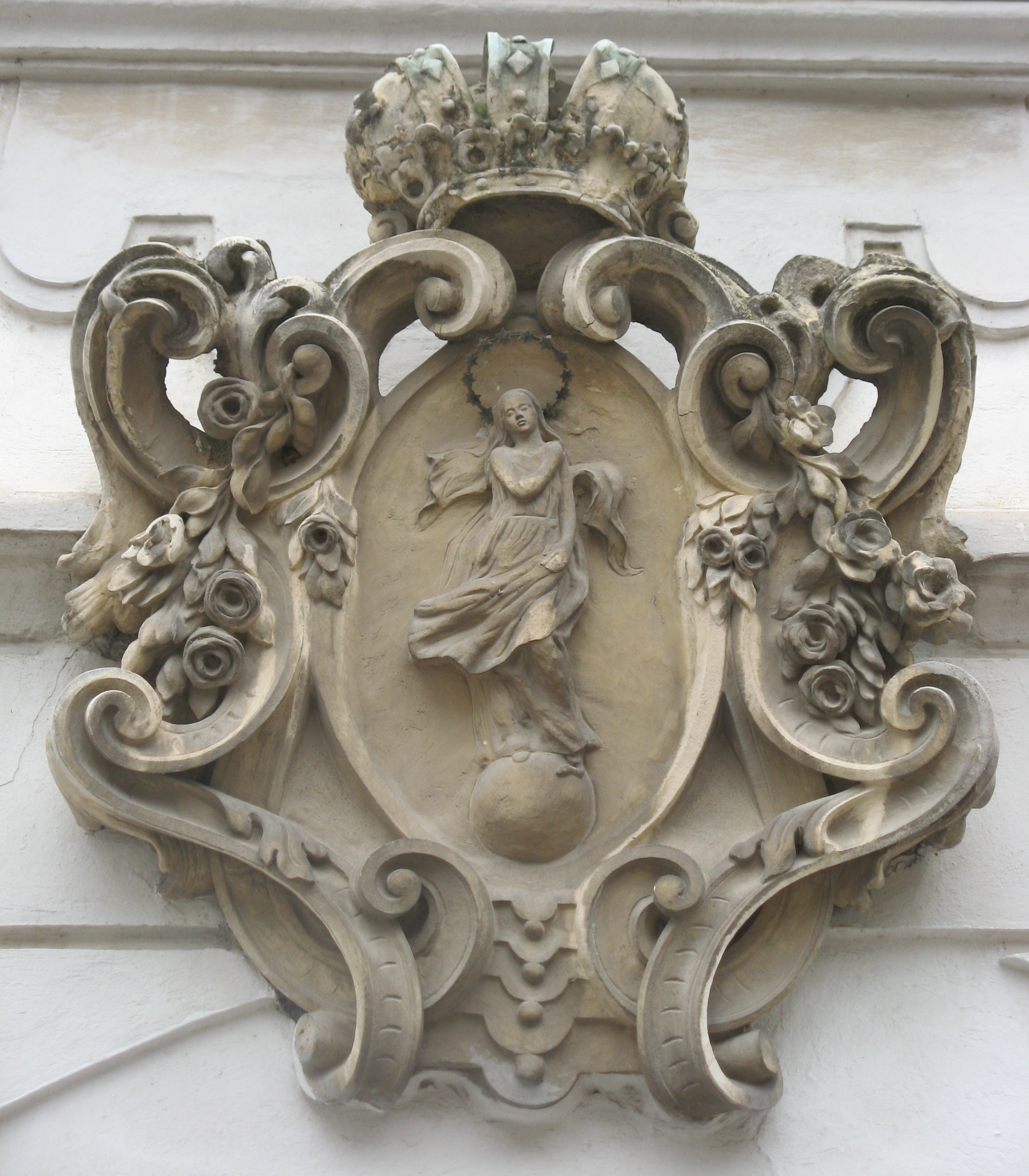 Wappenkartusche am Prentlhof (18. Jh.), Klederinger Straße 169, Unterlaa, Wien-Favoriten